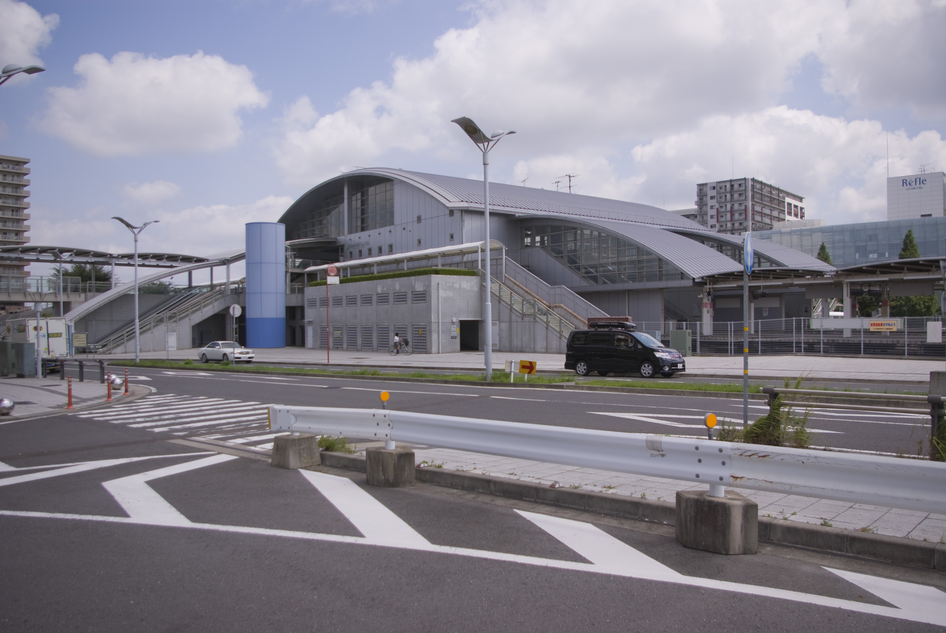 JR常磐線ひたち野うしく駅